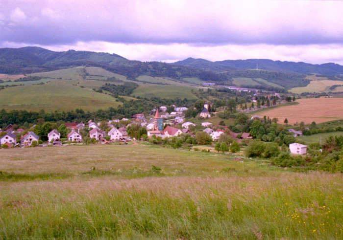 Richvald Village (Slovakia)